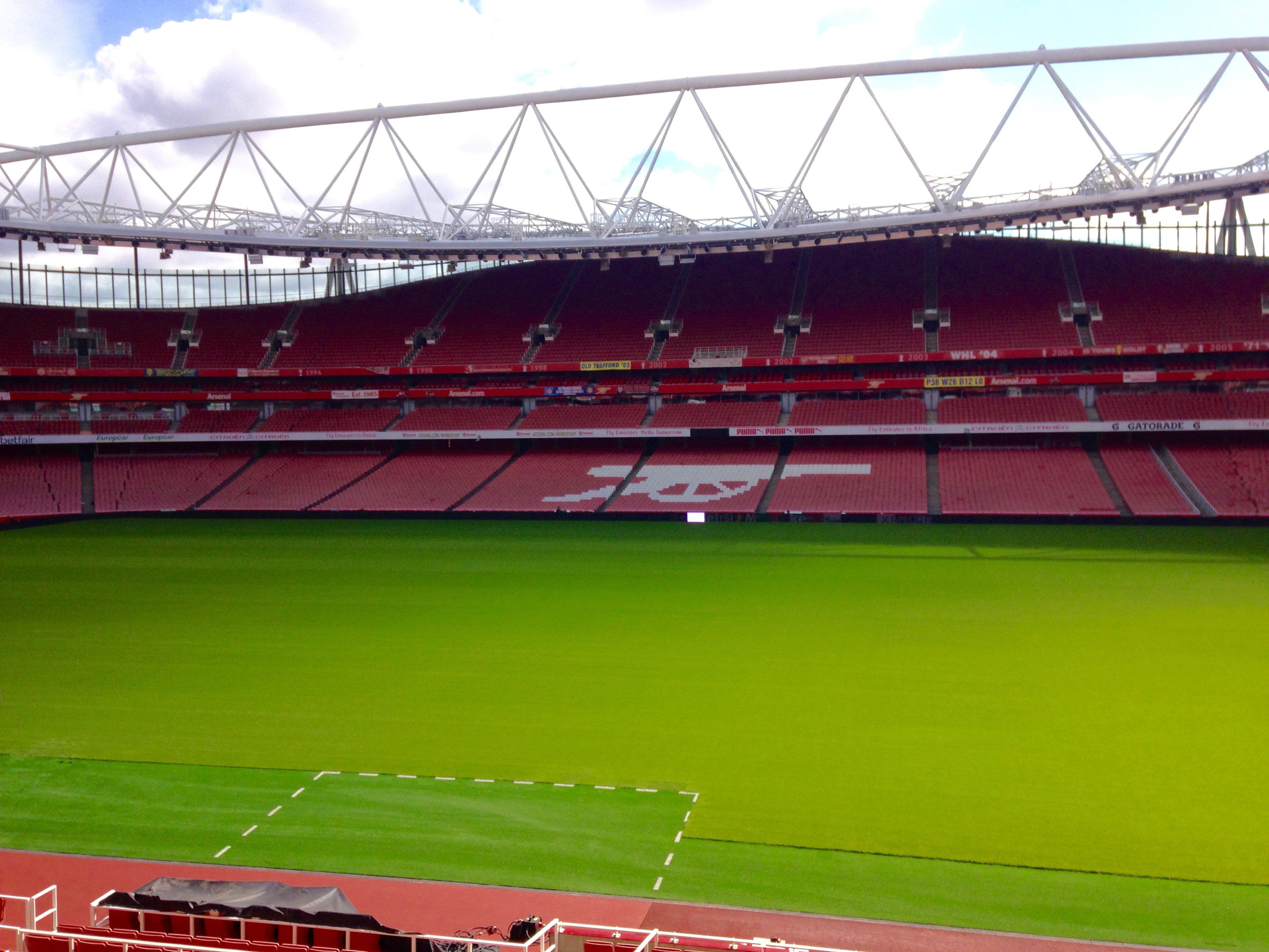 Emirates Stadium